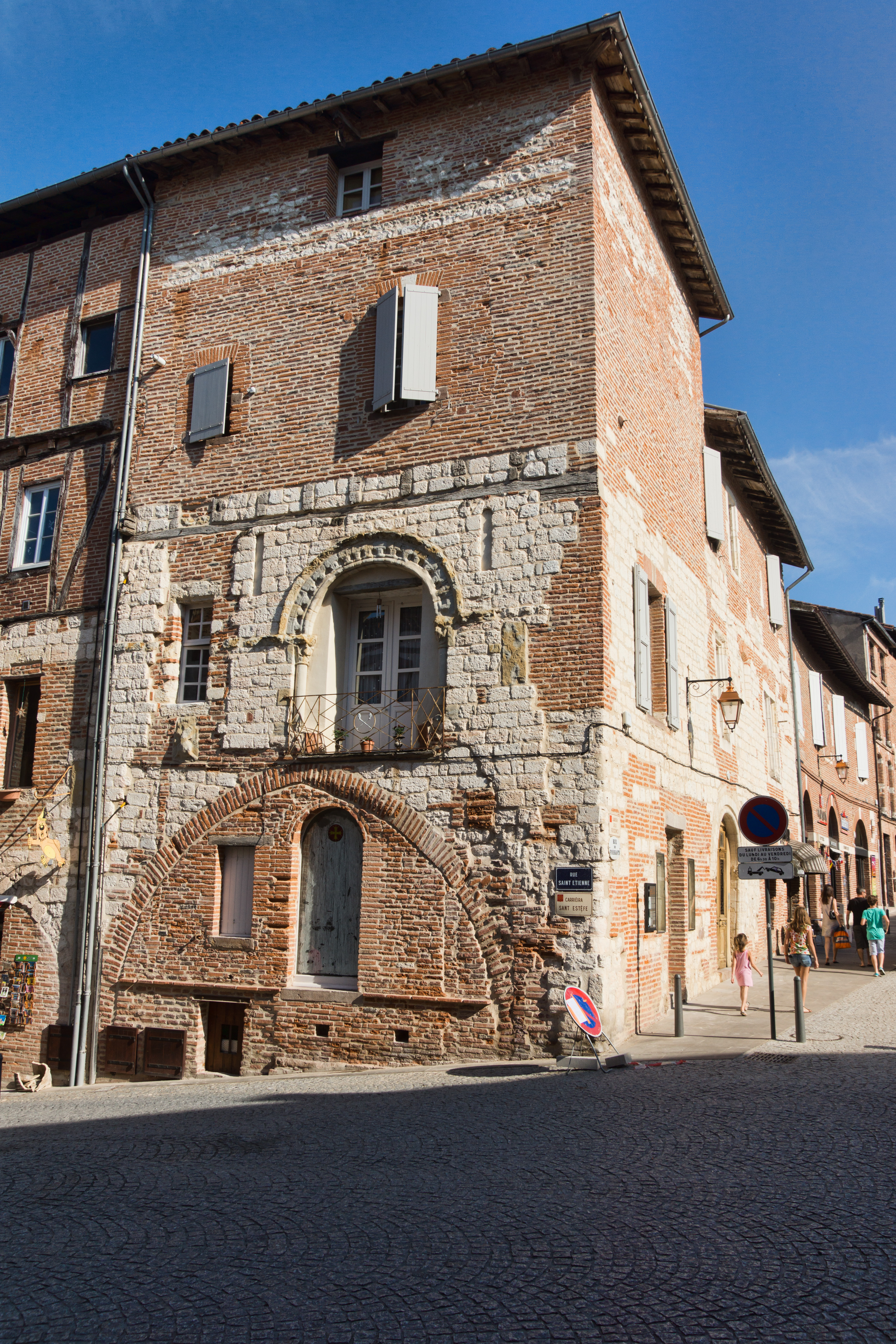 Albi : Maison angle 1 rue des Foissants et rue St Étienne. Rue Saint-Étienne.